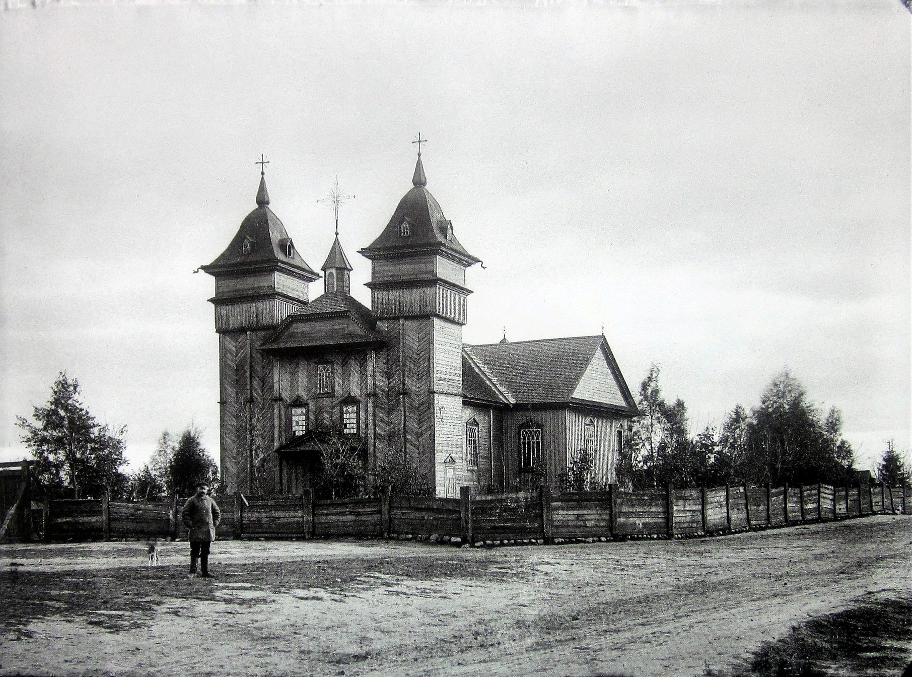 Беларуская (тарашкевіца): Еўе (Jeŭje), вуліца Касьцельная (vulica Kaścielnaja). Стары касьцёл